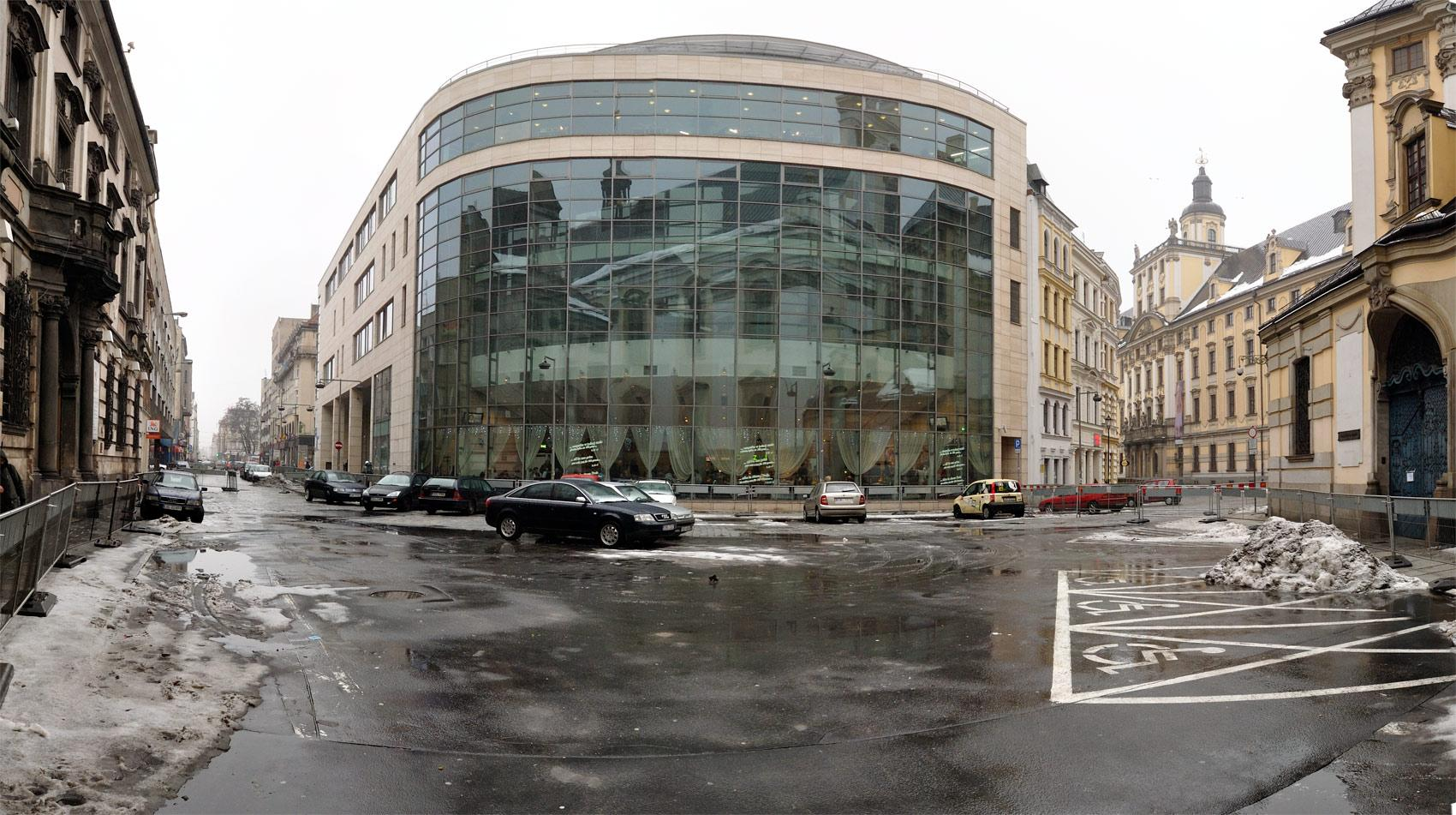 Plac Uniwersytecki a z lewej strony wylot ulicy Kuźniczej.